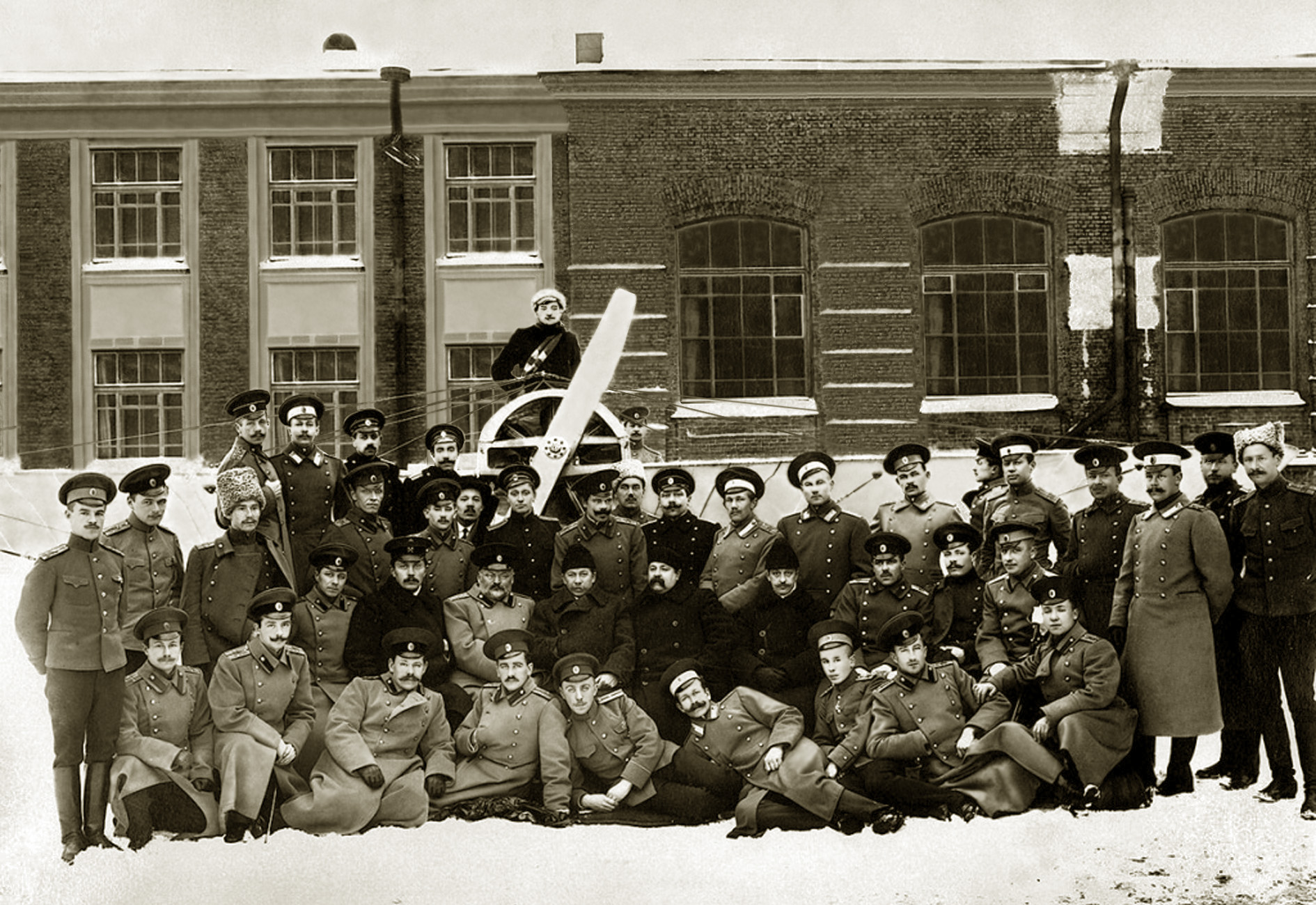 Офицерские теоретические курсы авиации и воздухоплавания им. В. В. Захарова при Петербургском политехническом институте. Во втором ряду в центре сидят преподаватели курсов: Н.А. Рынин (инициатор создания курсов), В.Ф. Найденов (товарищ председателя Императорского Всероссийского аэроклуба), К.И. Боклевский, А.П. Фан-дер-Флит.